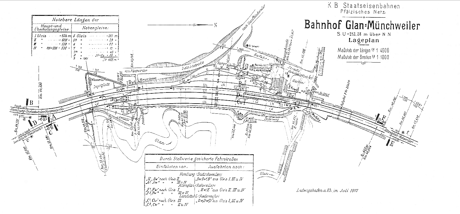 Gleisplan des Bahnhof glan-Münchweiler im Jahr 1911